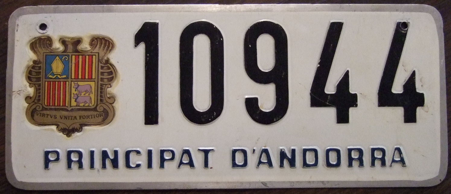 Andorra passenger license plate 1970's